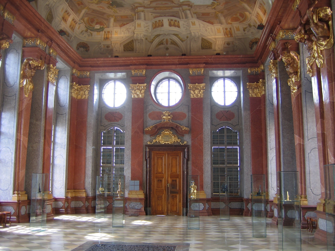 Stift Melk, Austria, Marmorsaal (marble hall)